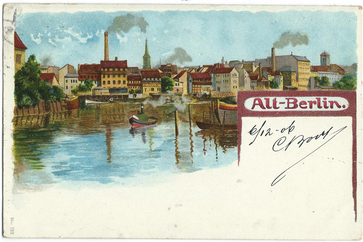 Vue de Berlin au début du XXe siècle (carte postale).